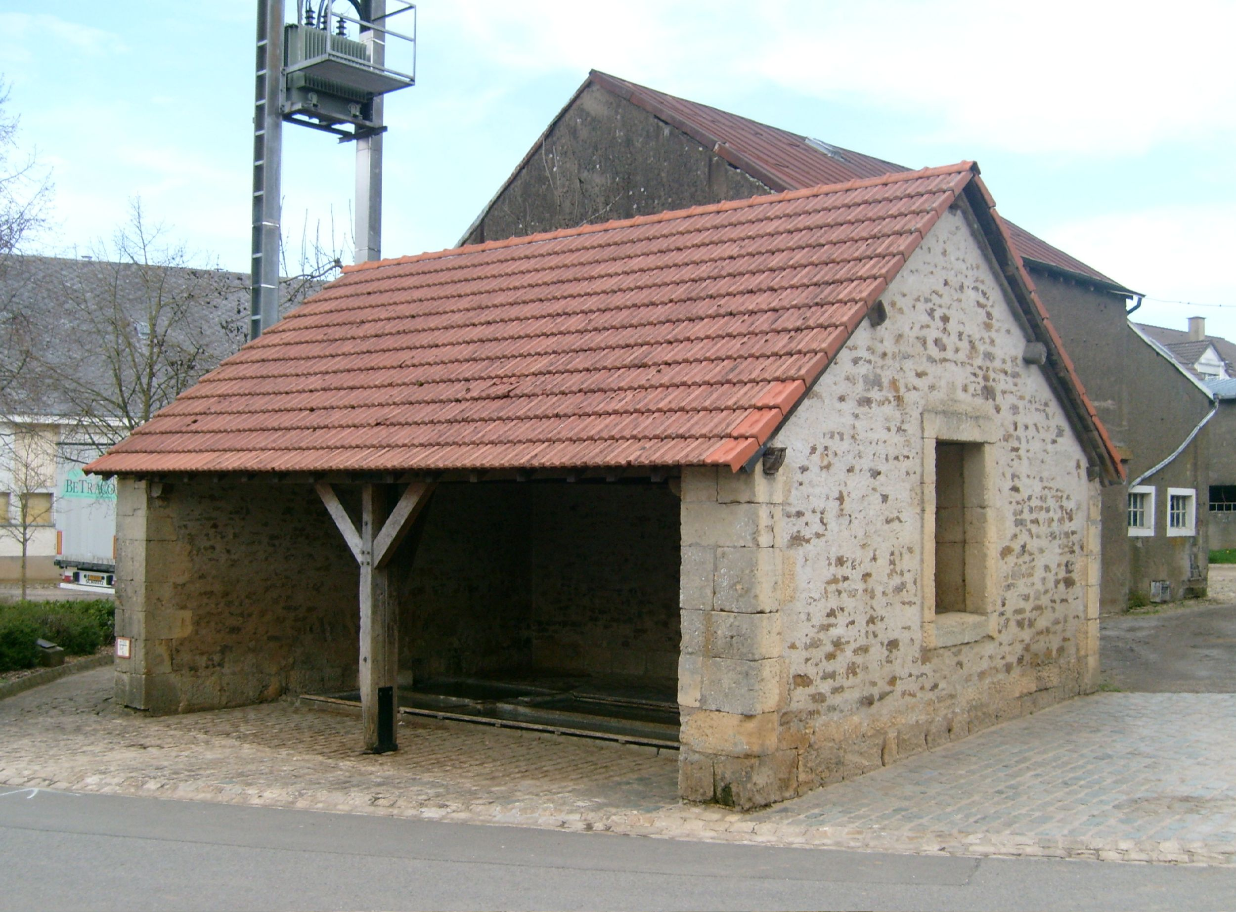 De Wäschbur vu Féngeg.